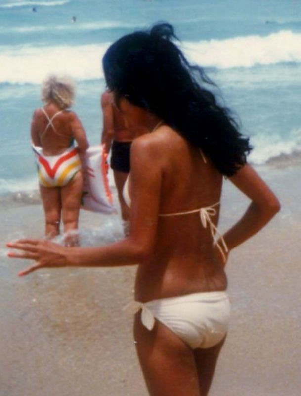 Tanga Low Rise Bikini #2 ; Waikiki Beach (Honolulu, Hawaii)